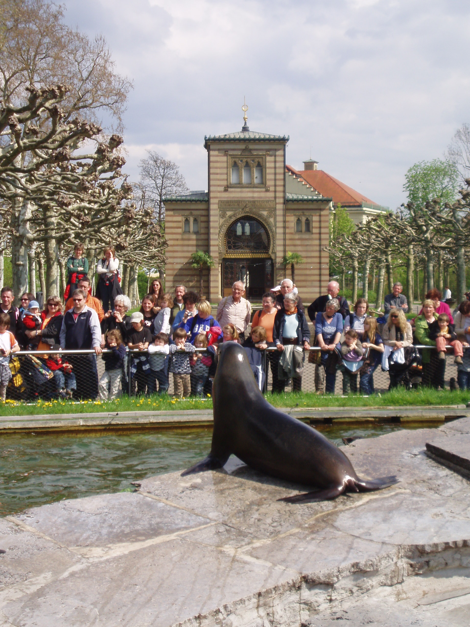 Wilhelma